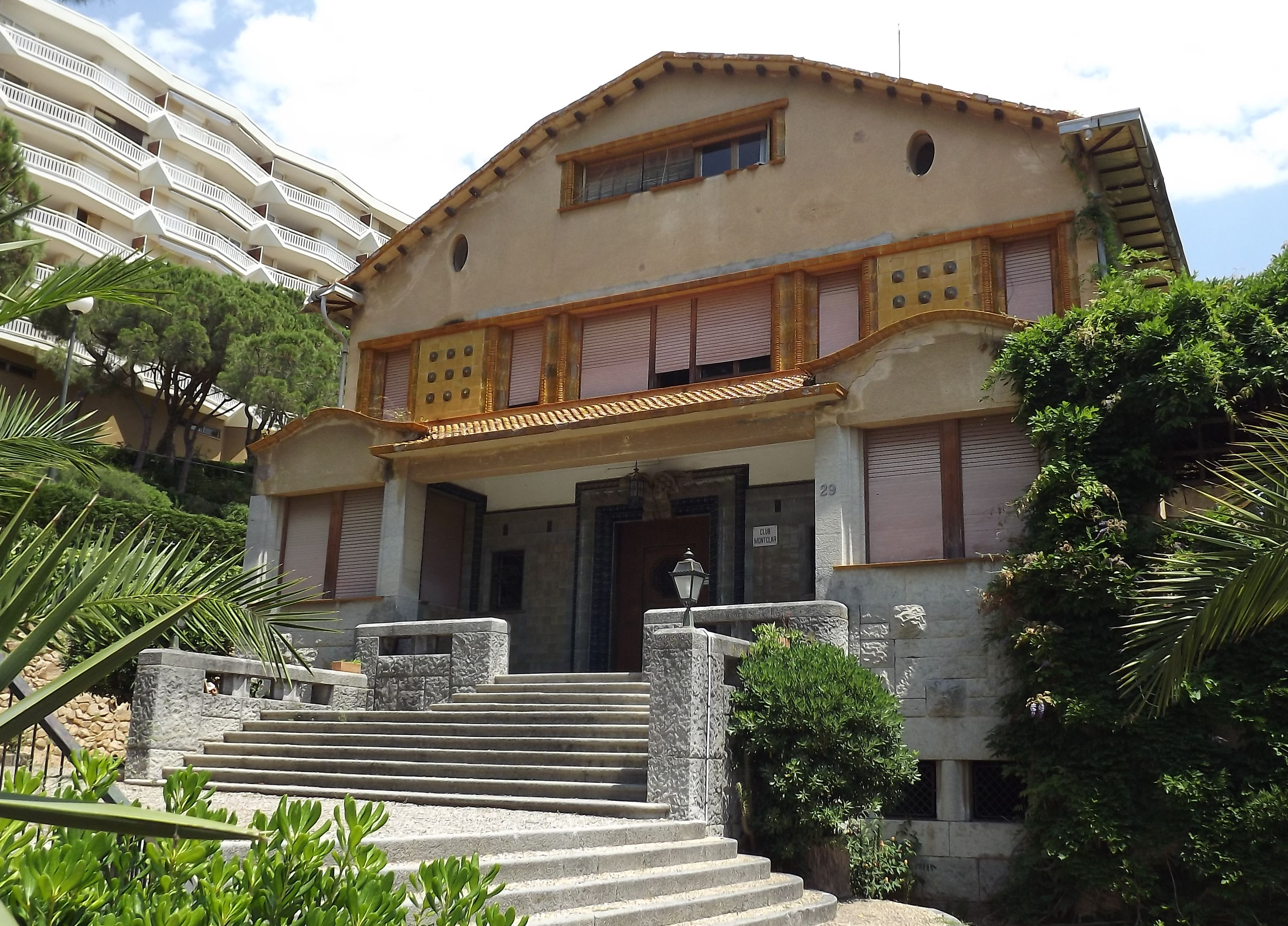 Casa isolada